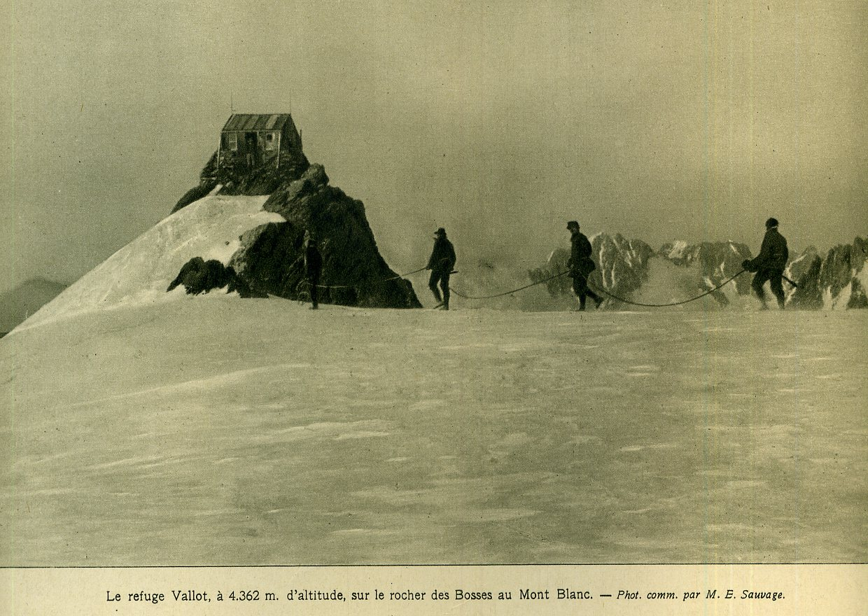 see picture